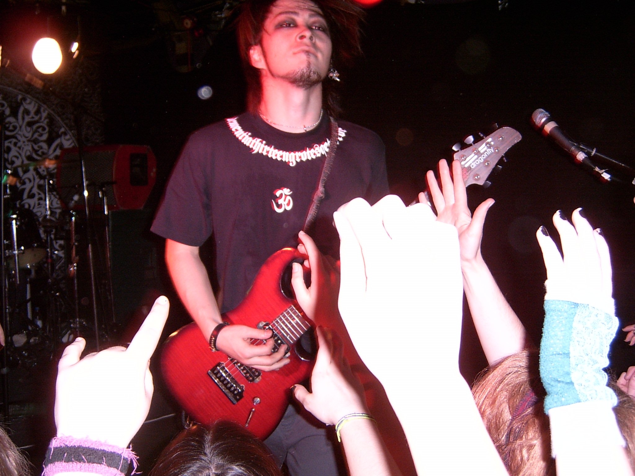 Foto de Miya, guitarrista de MUCC durante su concierto en Londres.